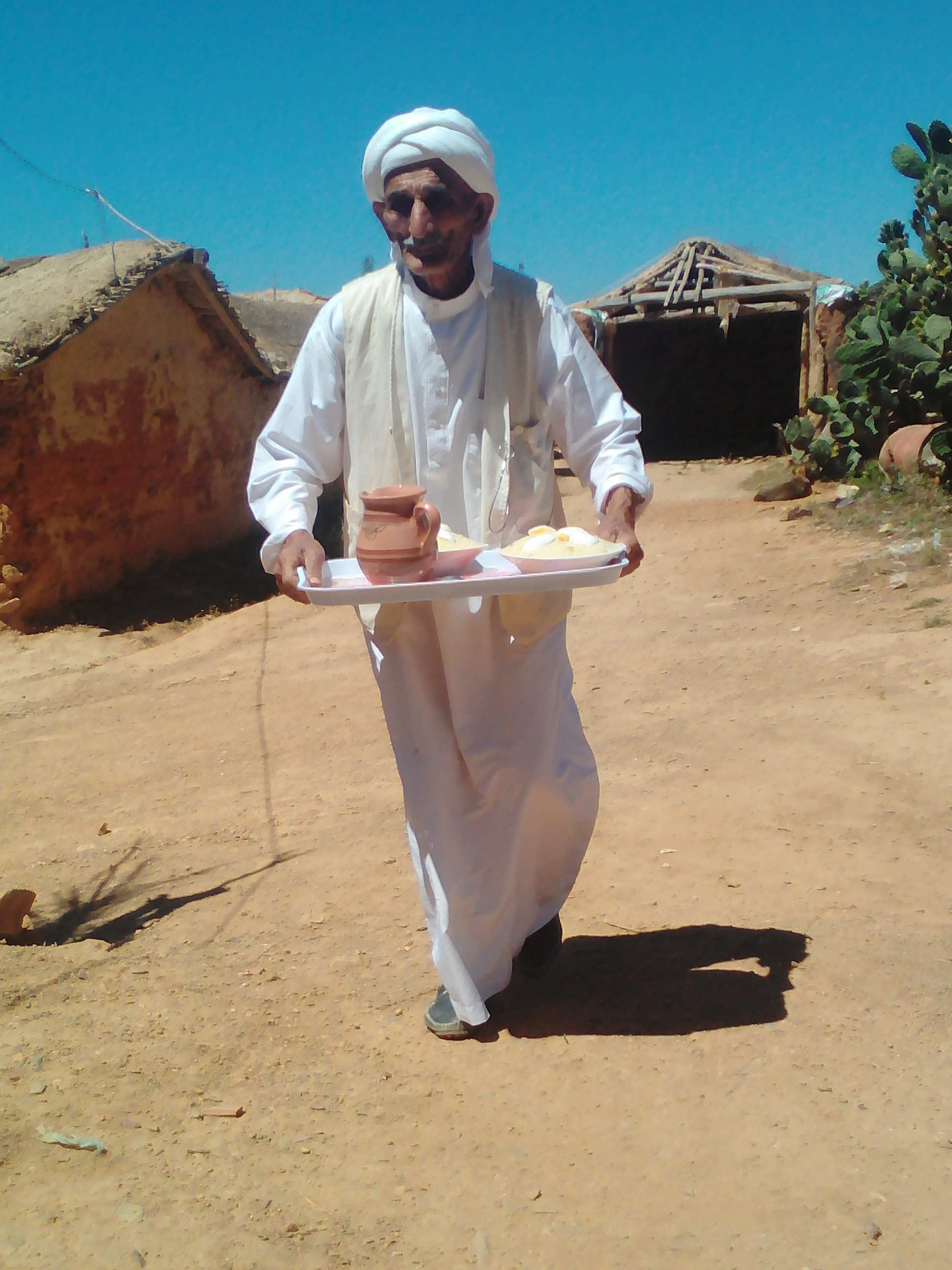 تعتبر الجزائر من الدول المتميّزة على الصعيد العربي والعالمي، فهي تحتوي على العديد ,من المناطق السياحيّة الجميلة والتضاريس المختلفة وتنوع تراثها شمالا جنوبا, شرقا غربا